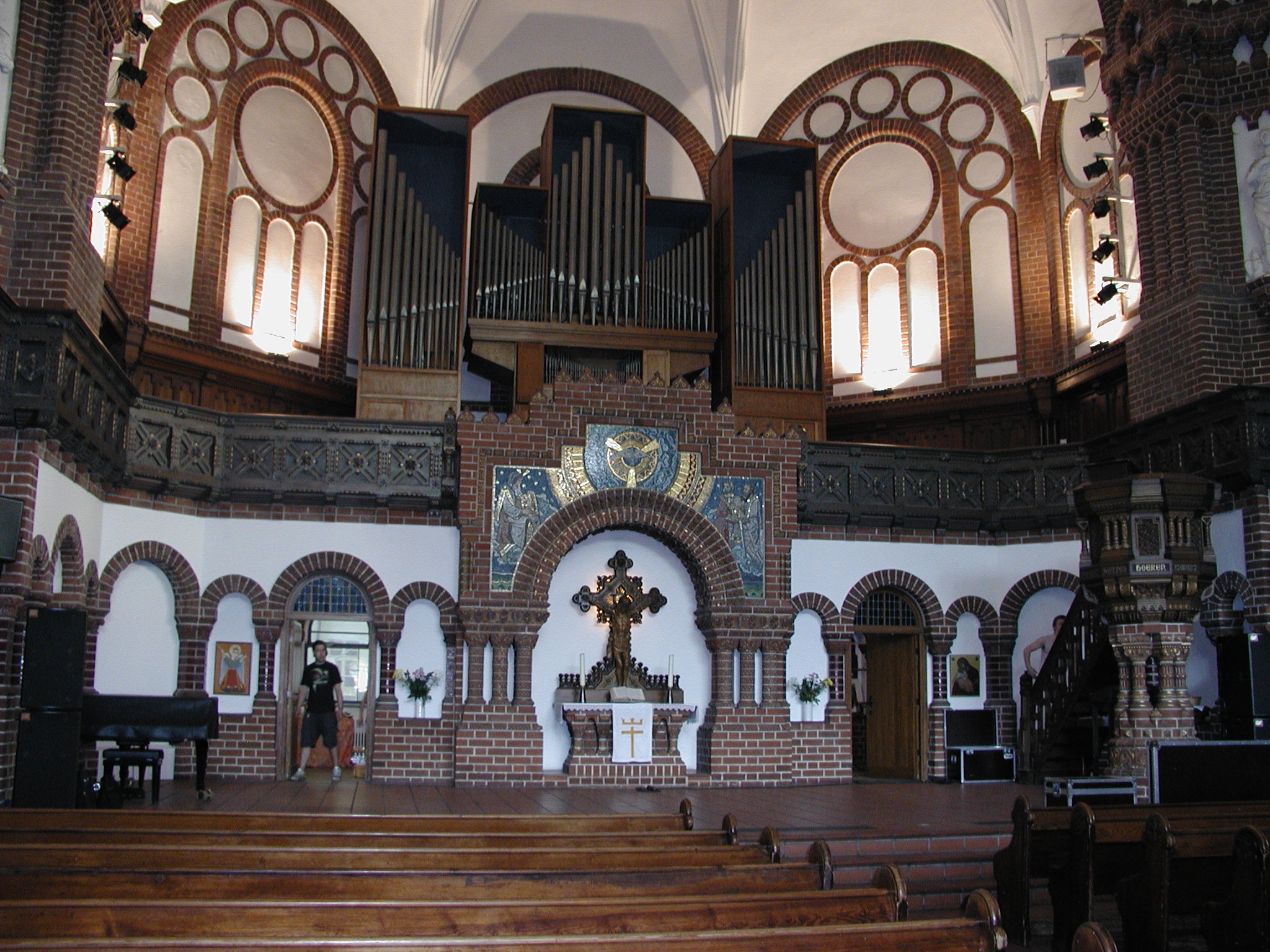 Der Innenraum der Passionskirche in Berlin-Kreuzberg